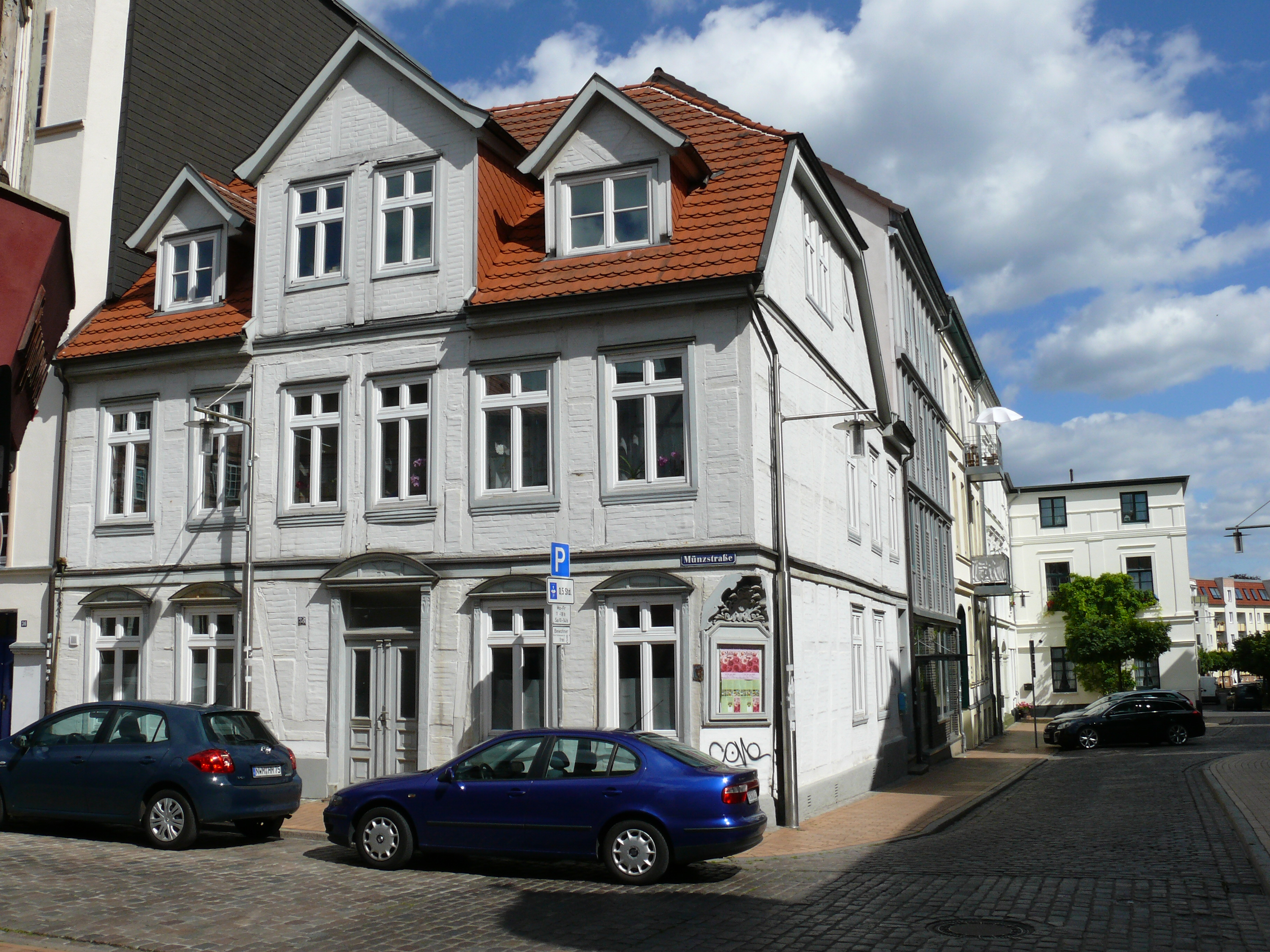 Das Gebäude "Münzstraße 38" in Schwerin.